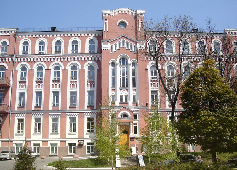 Урологический корпус Александровской больницы в Киеве